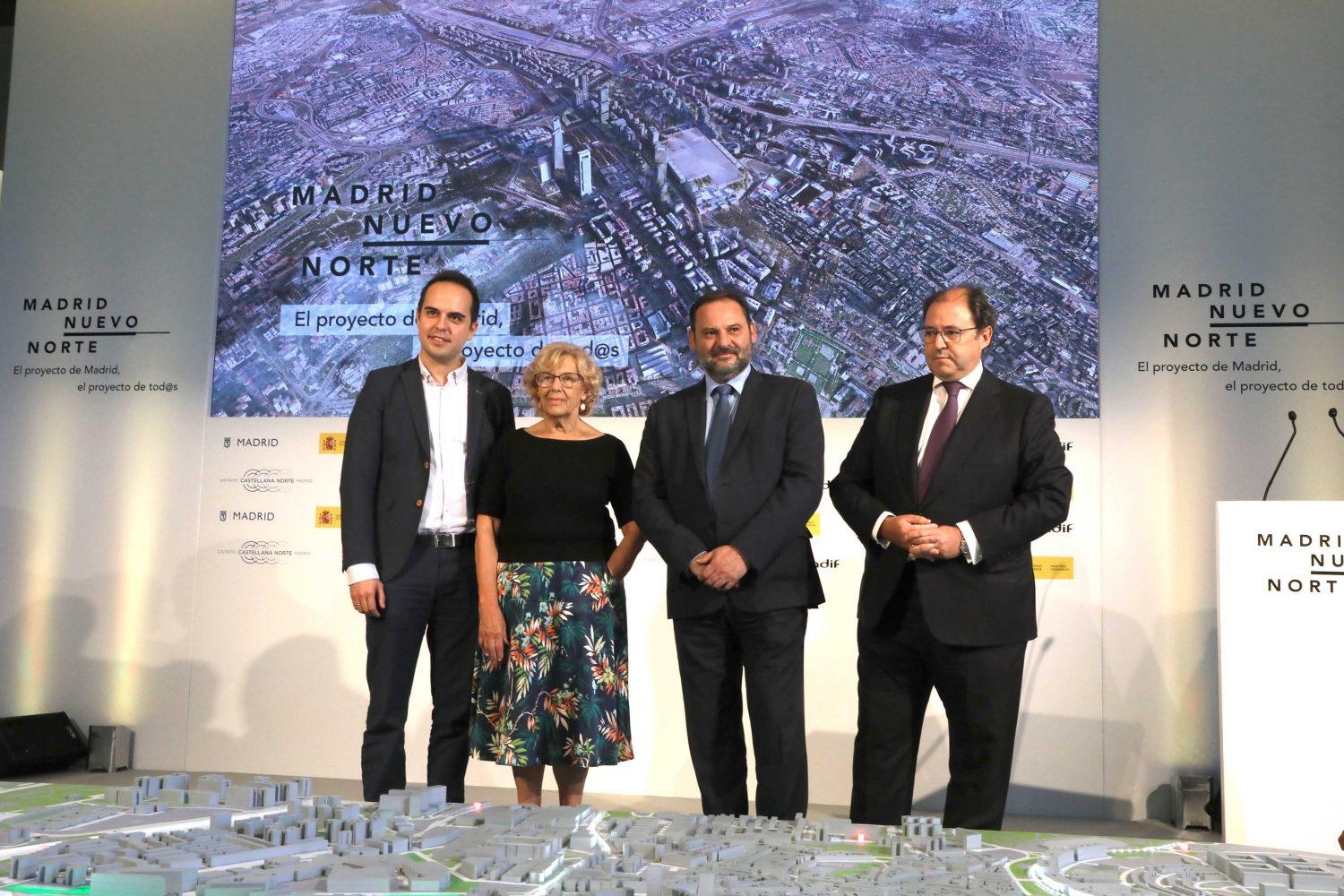 La alcaldesa de Madrid, Manuela Carmena, junto al ministro de Fomento, José Luis Ábalos y el presidente de Distrito Castellana Norte (DCN), Antonio Béjar, y acompañada por el delegado del Área de Desarrollo Urbano Sostenible, José Manuel Calvo, ha presentado esta mañana, viernes 27 de julio, en el Palacio de Cibeles, la propuesta final para desarrollar el proyecto ‘Madrid Nuevo Norte’, redactada tras el acuerdo de las administraciones y de la empresa que gestiona el ámbito y que posibilitará su desarrollo a partir del próximo año.